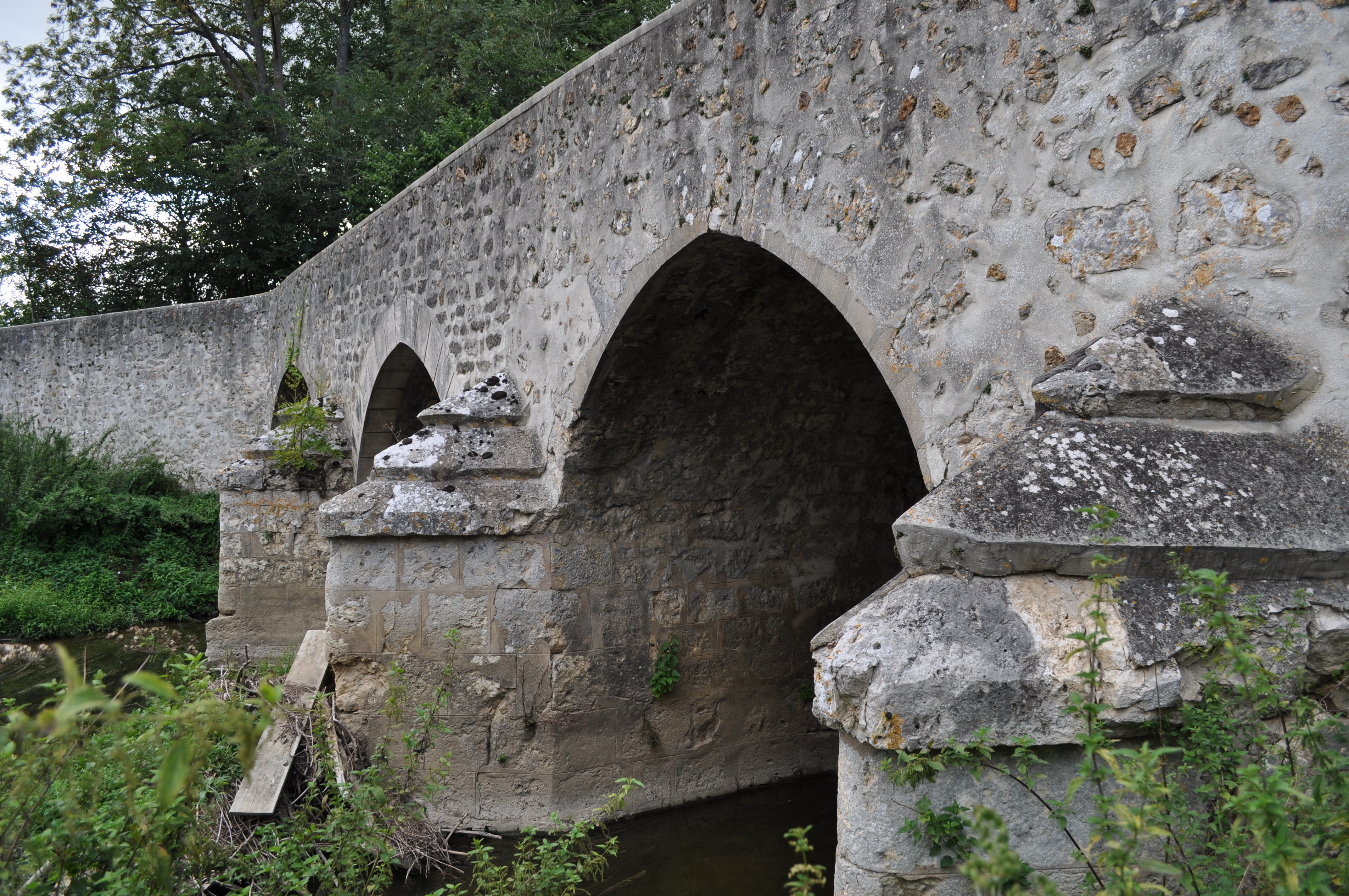 Pont-Saint-Pierre d'Évry-Grégy-sur-Yerre (77) .